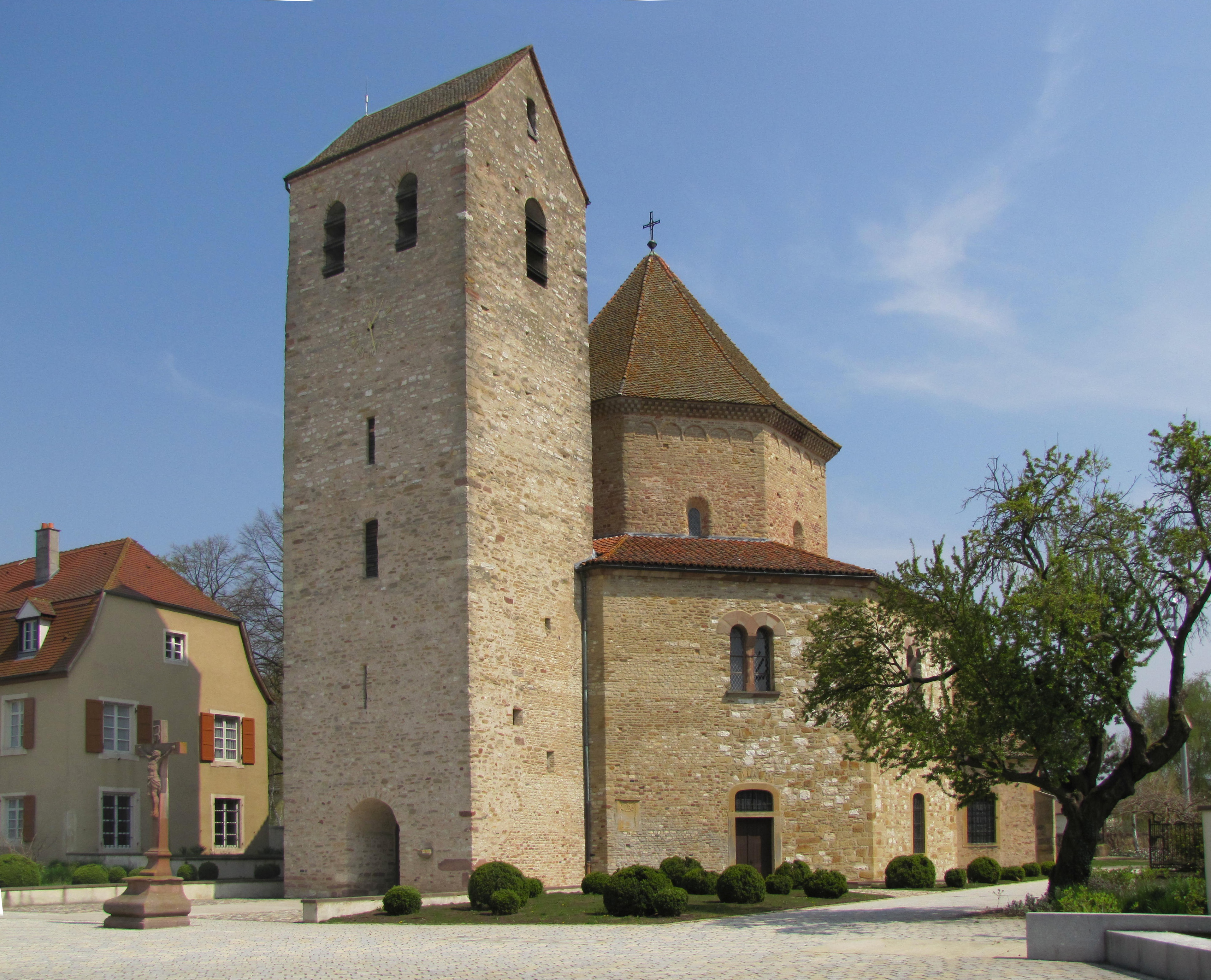 Alsace, Haut-Rhin, Ottmarsheim, Église abbatiale d'Ottmarsheim (PA00085580, IA00096033).